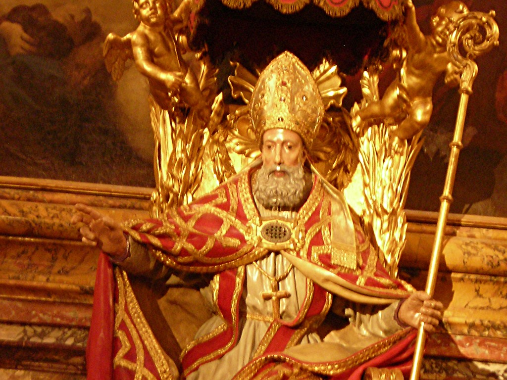 statue of San Feliciano di Foligno, Perugia, Umbria, Italy